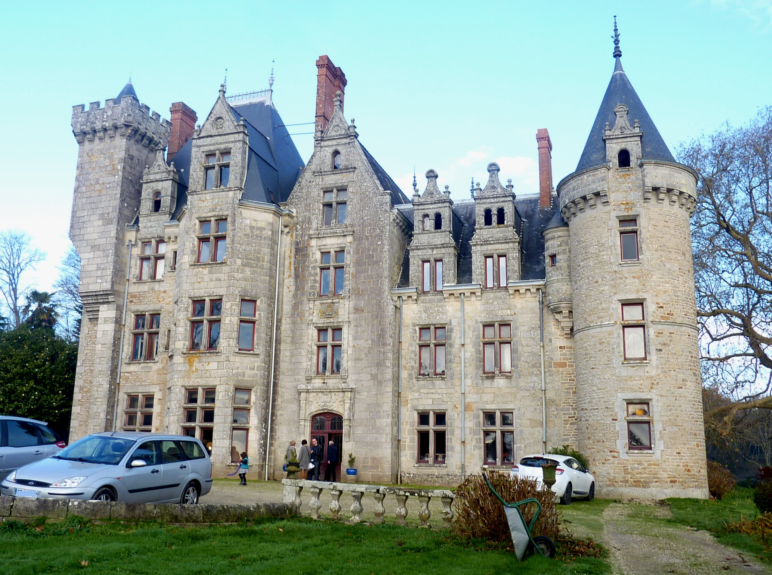 Plomelin : le château de Pérennou sur la rive droite de l'Odet